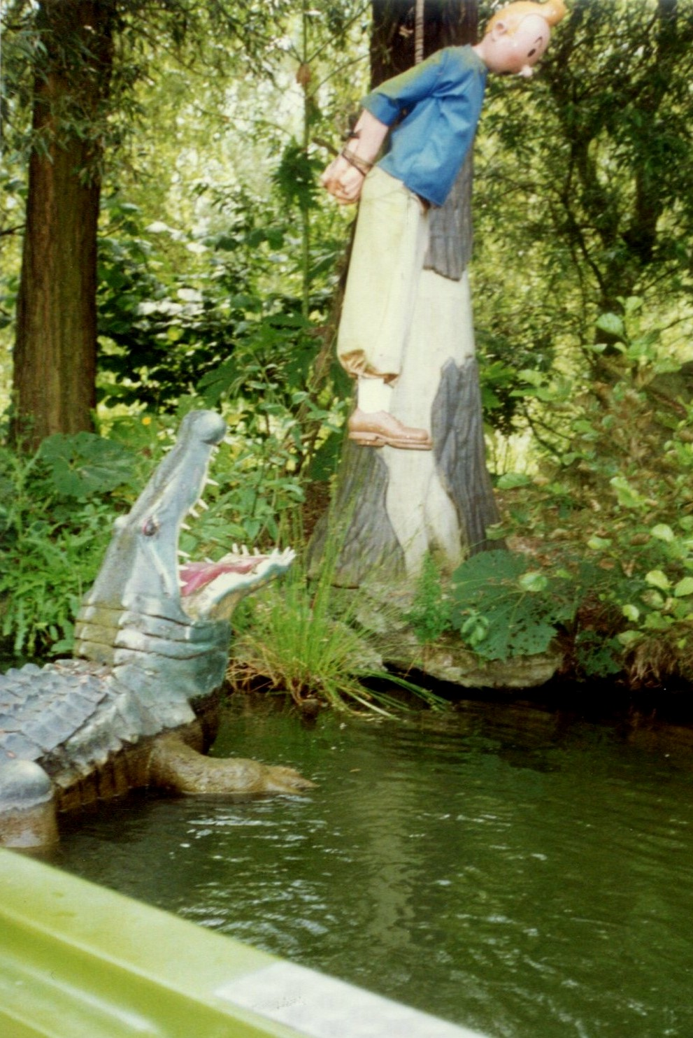 WalibiTintinJungle